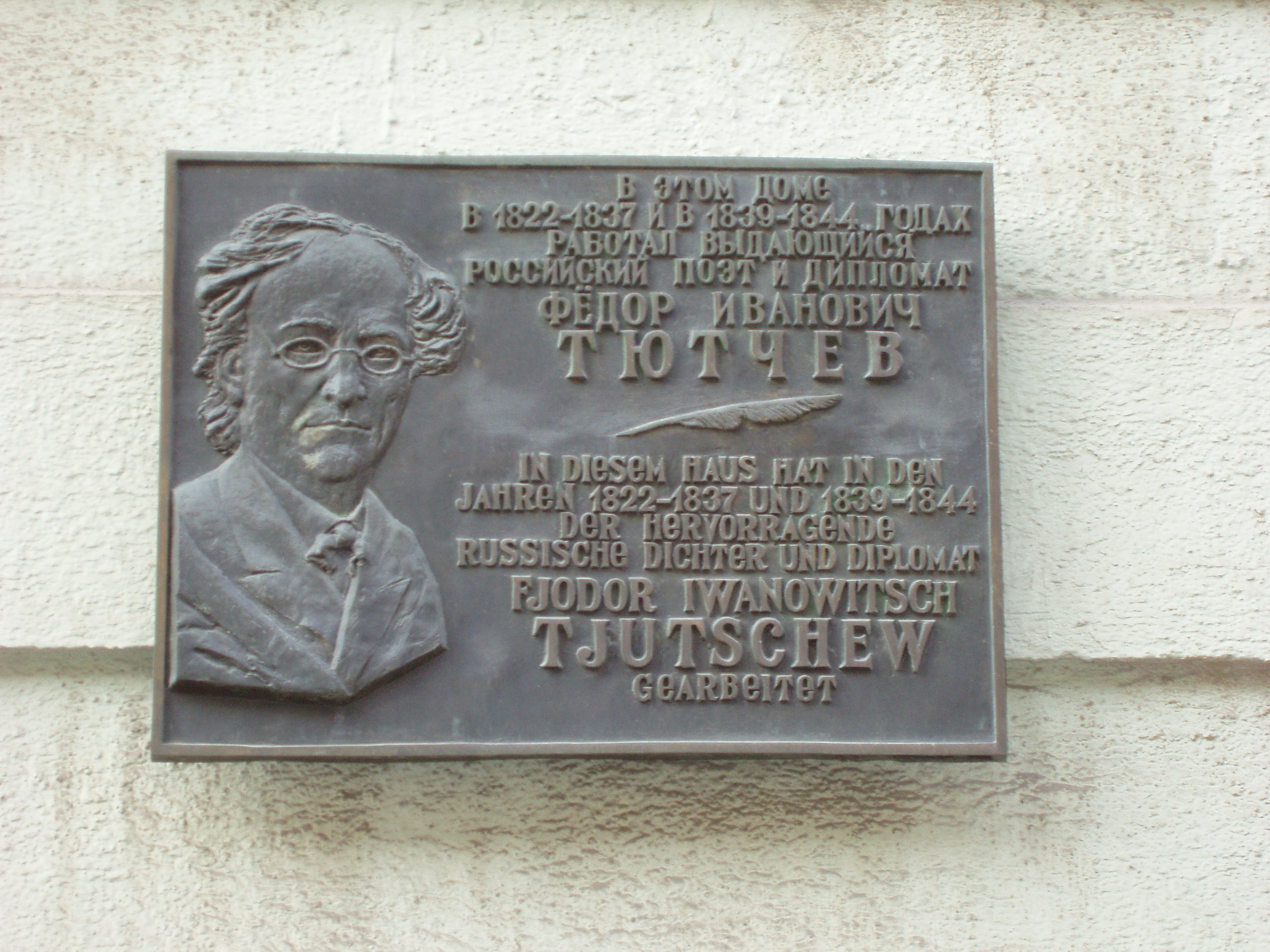 Tjuttschew-Gedenktafel in München, Herzogspitalstraße 12. Von I. N. Nowikow und A. K. Tichonow, eingeweiht 1999.